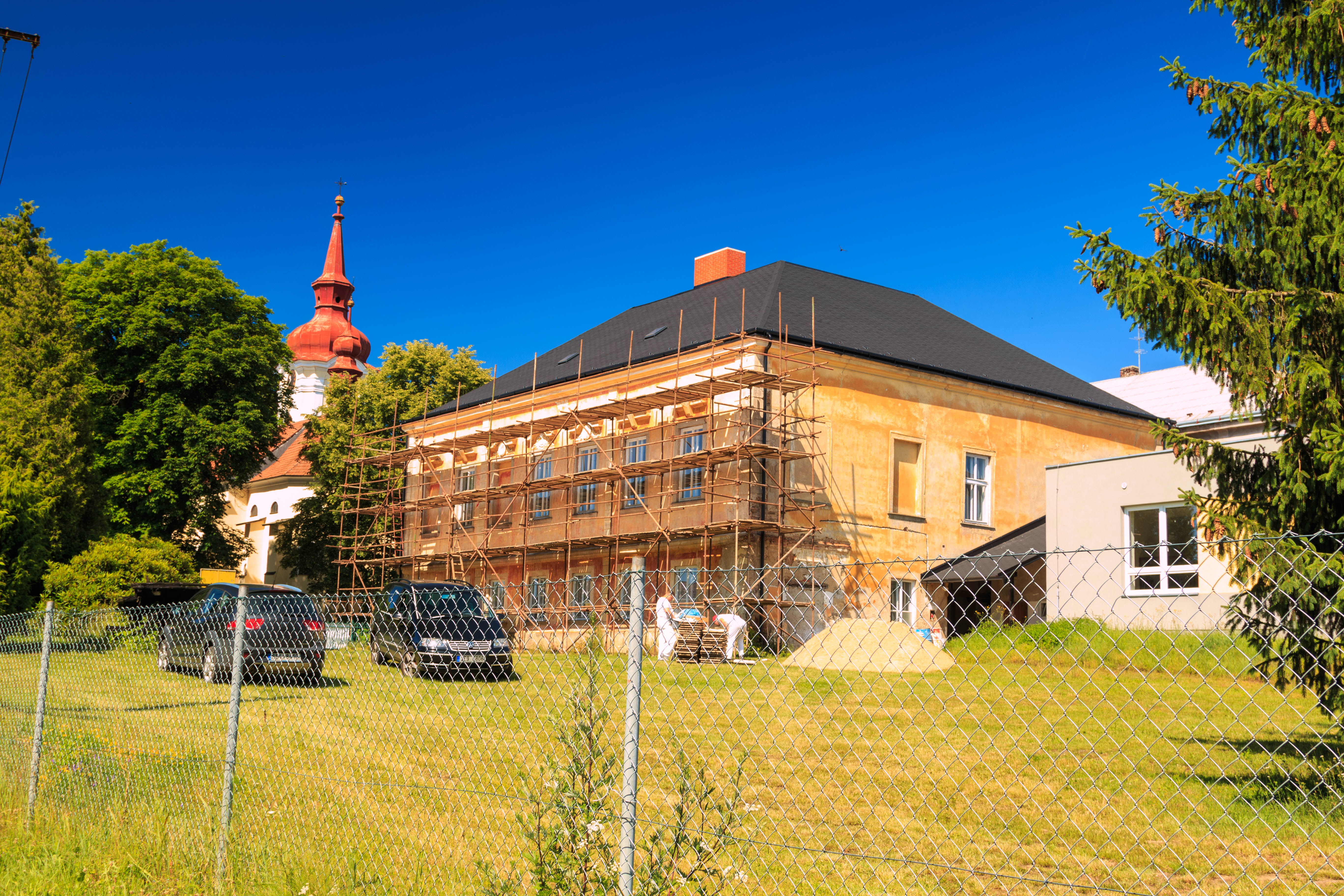 Zámek Habry